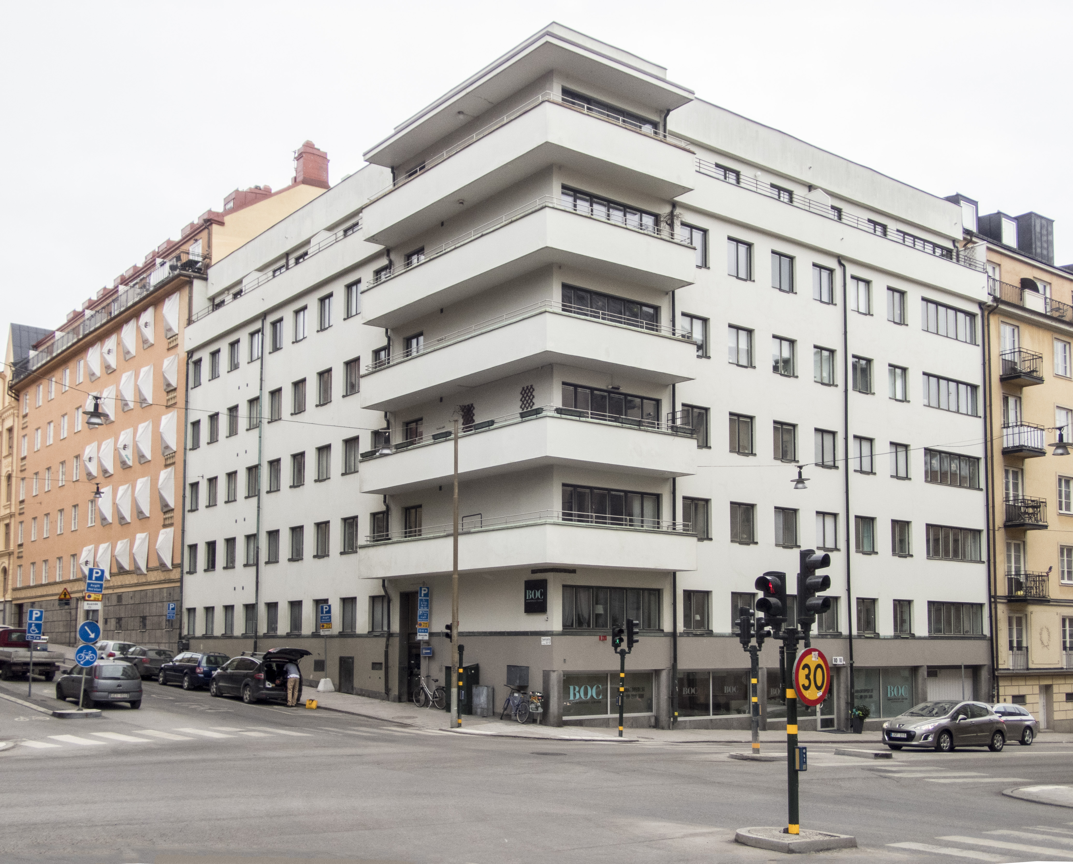 Berget 10, Dalagatan 10, Tegnérgatan 57 Stockholm Nybyggnadsår 1929 - 1930 Fastighets AB N:o 10 Kv Berget (Byggherre) Hugo Ehrlin (Byggmästare) Sven Markelius (Arkitekt)